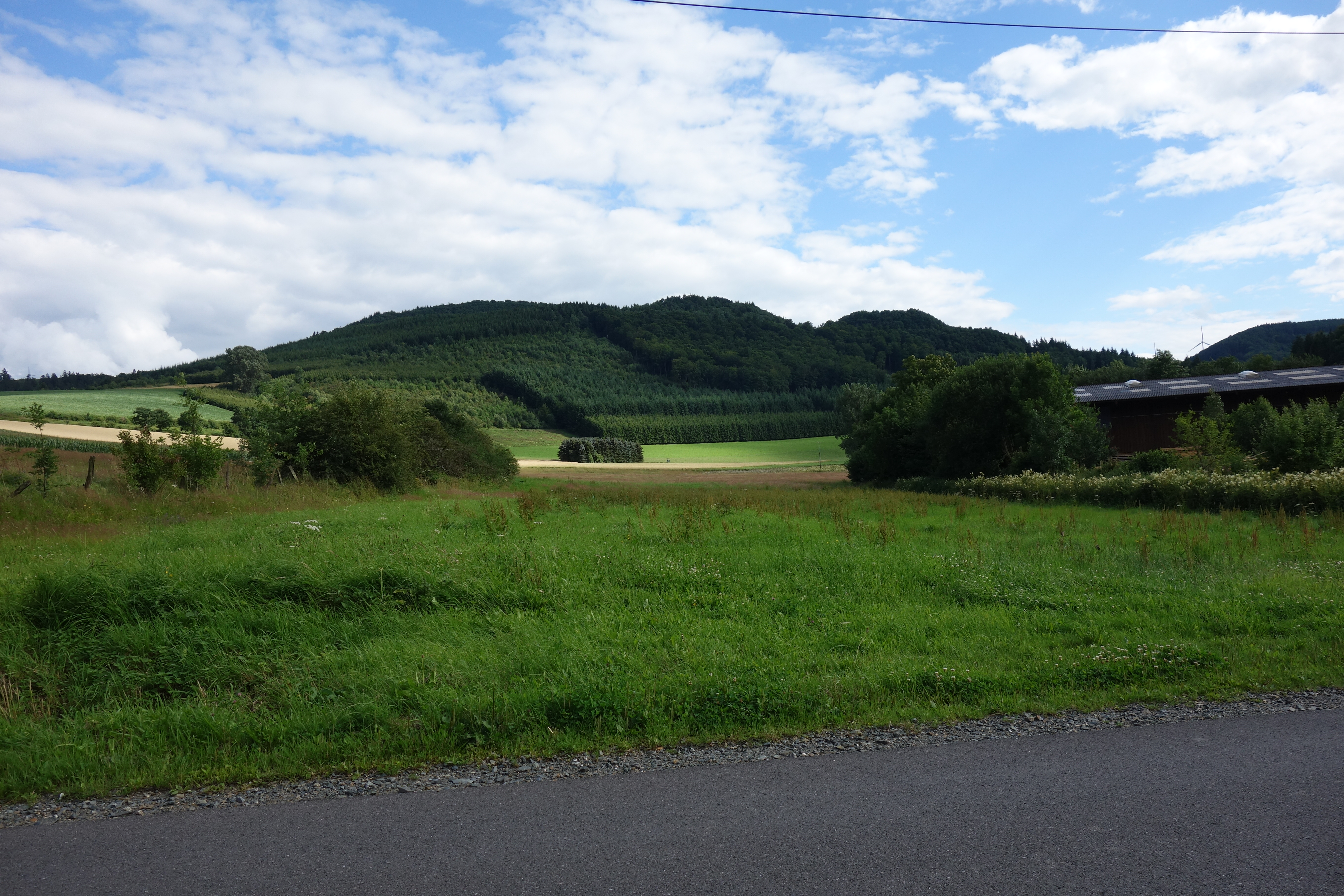 Offenland gehört zum Landschaftsschutzgebiet Rade östlich Löllinghausen; Wald zu LSG Meschede.